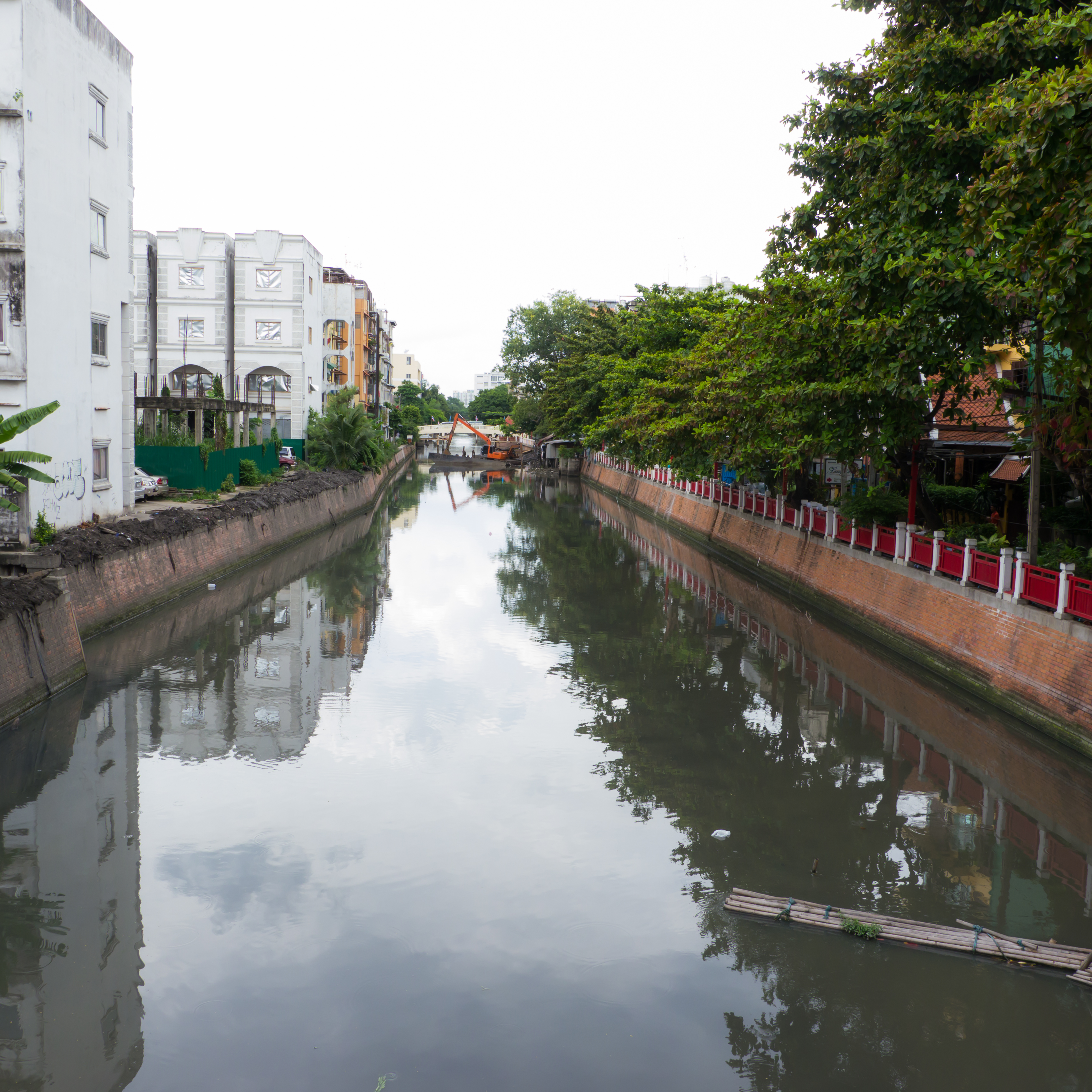 คลองรอบกรุง